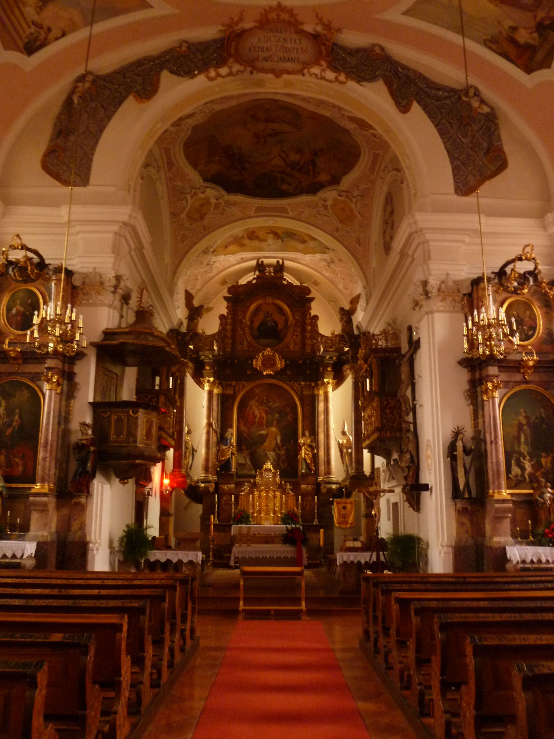 Kath. Pfarrkirche hl. Stephan und Friedhof